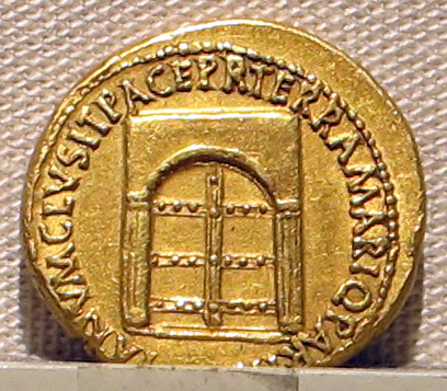 Palazzo Massimo alle Terme